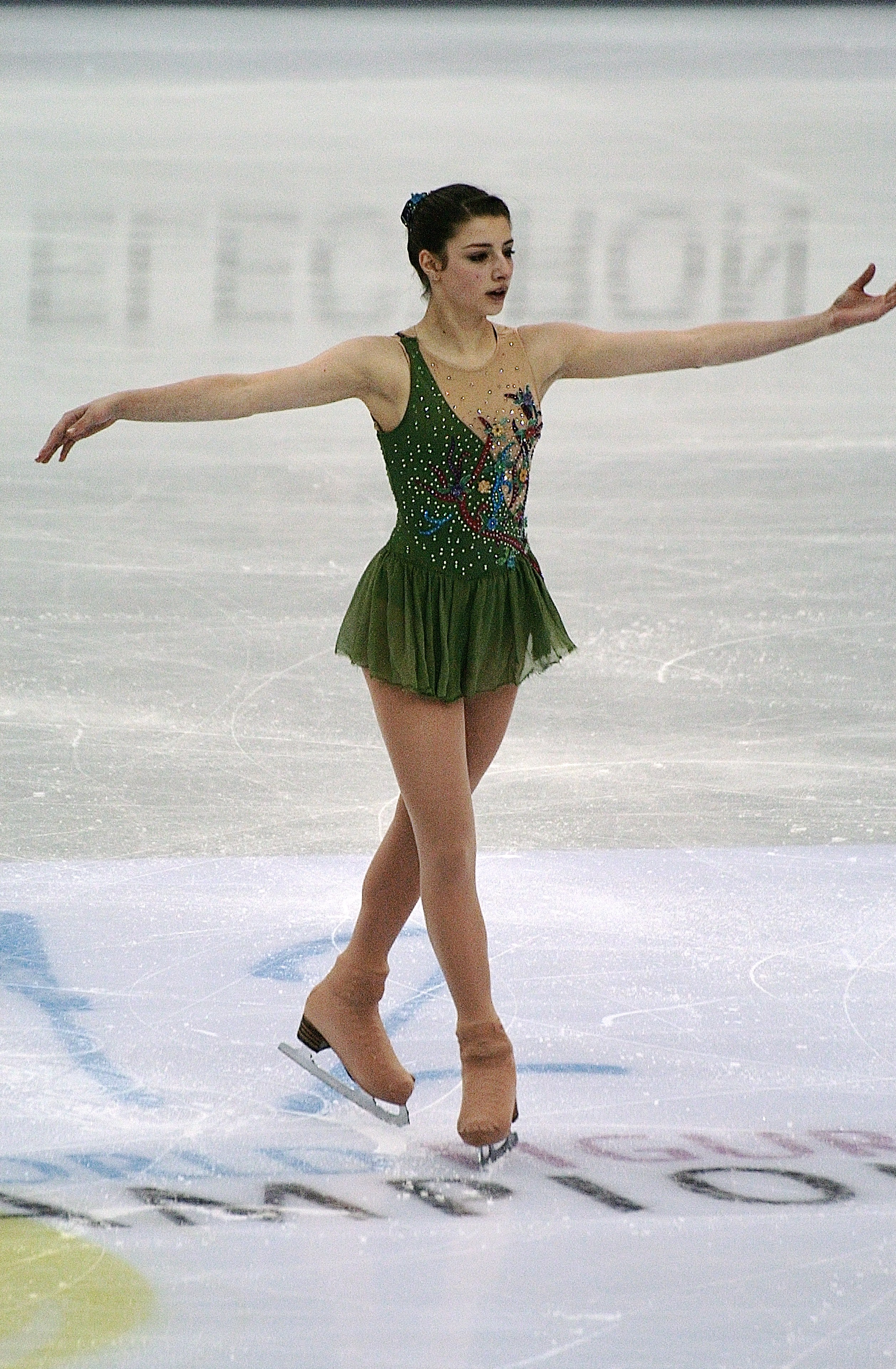 Шантель Керри (Австралия) на чемпионате мира по фигурному катанию 2012.